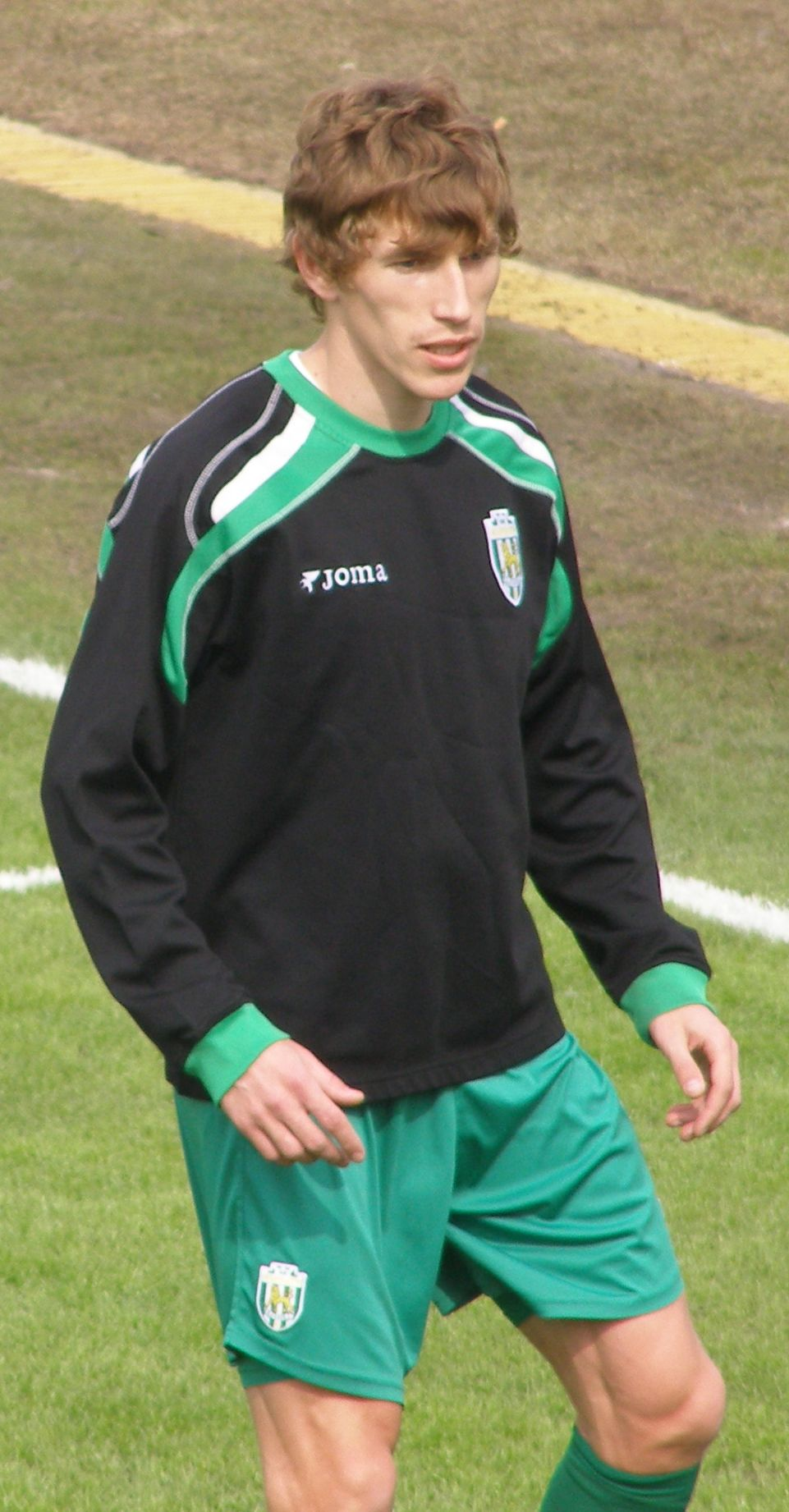 Taras Petriwskyj - ukrainischer Fußballspieler